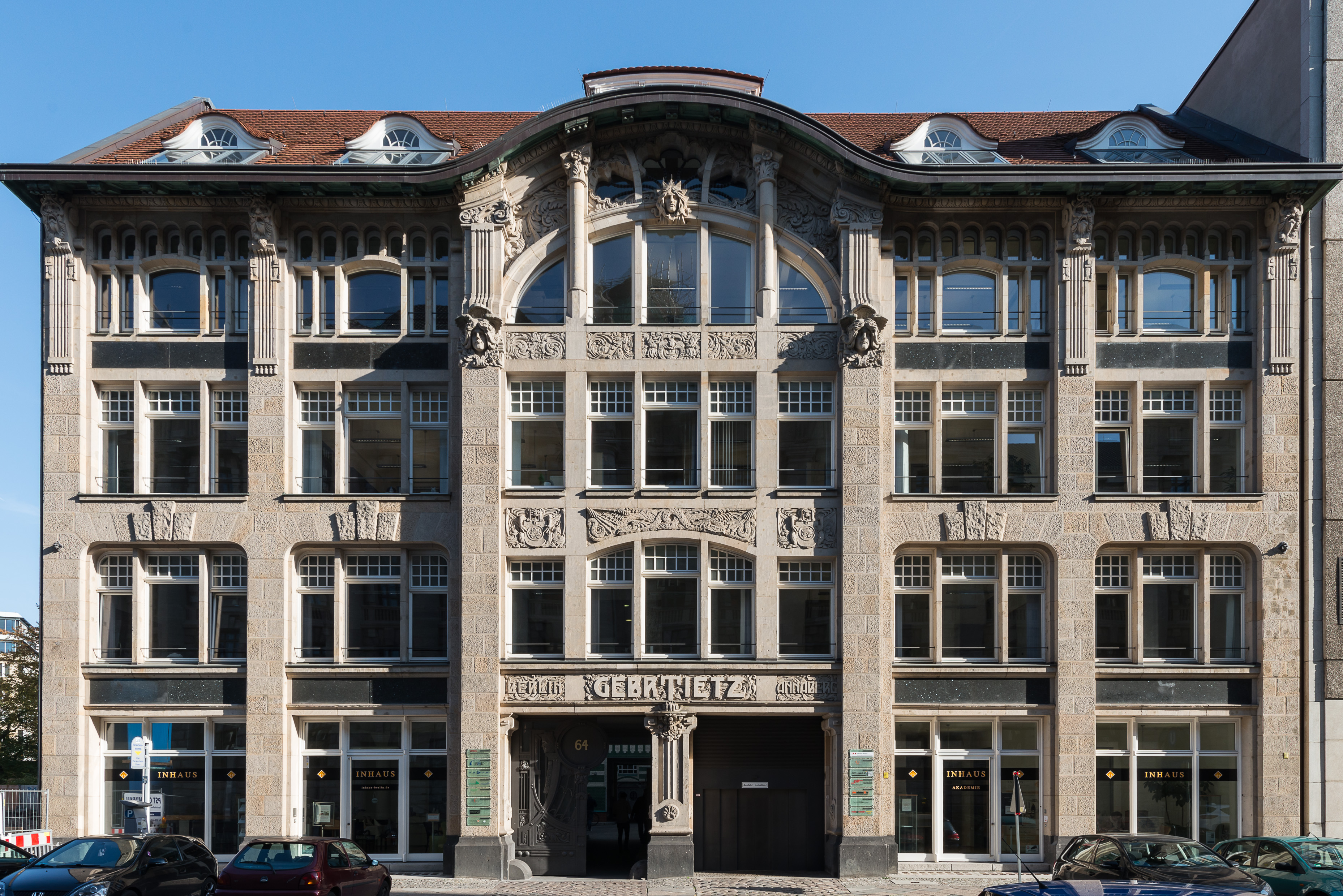 Fassade des Mercator Institue for China Studies in der Klosterstraße 64, Berlin